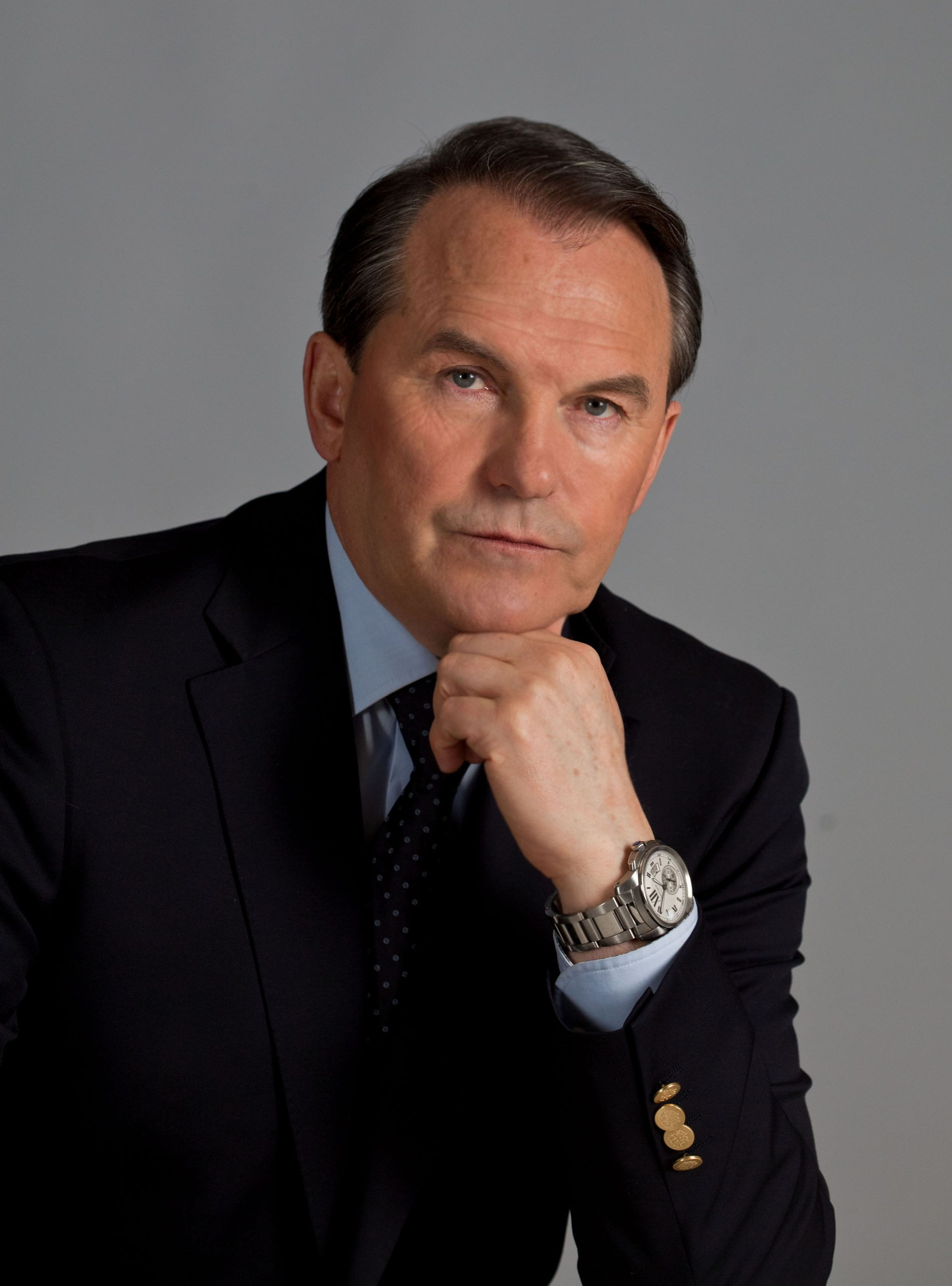 Игорь Николаевич Морозов